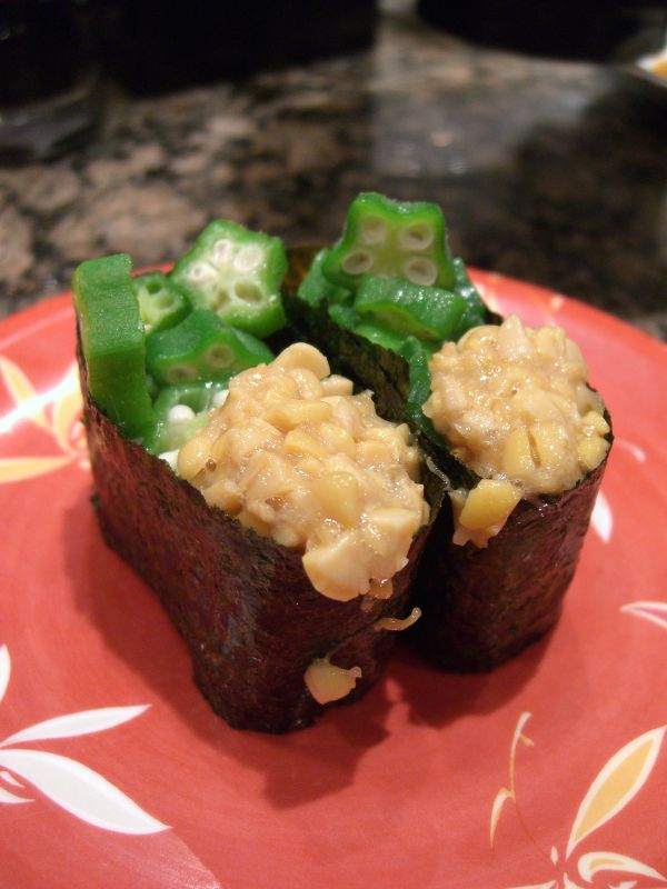 Natto and Okra Sushi - Kamakura. Extra slimy!Natto and Okra Sushi - Kamakura